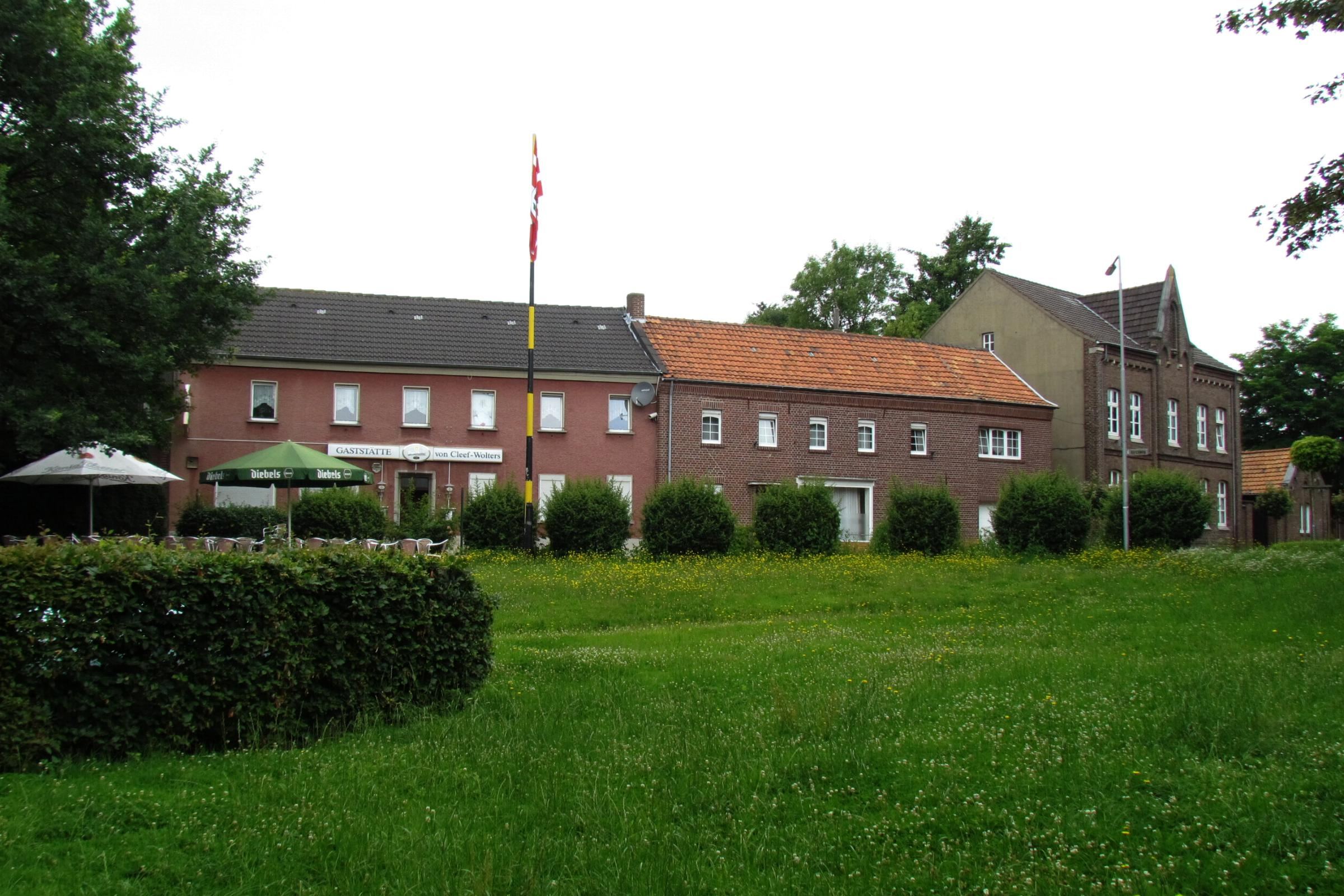 Saeffelen Ortsmitte